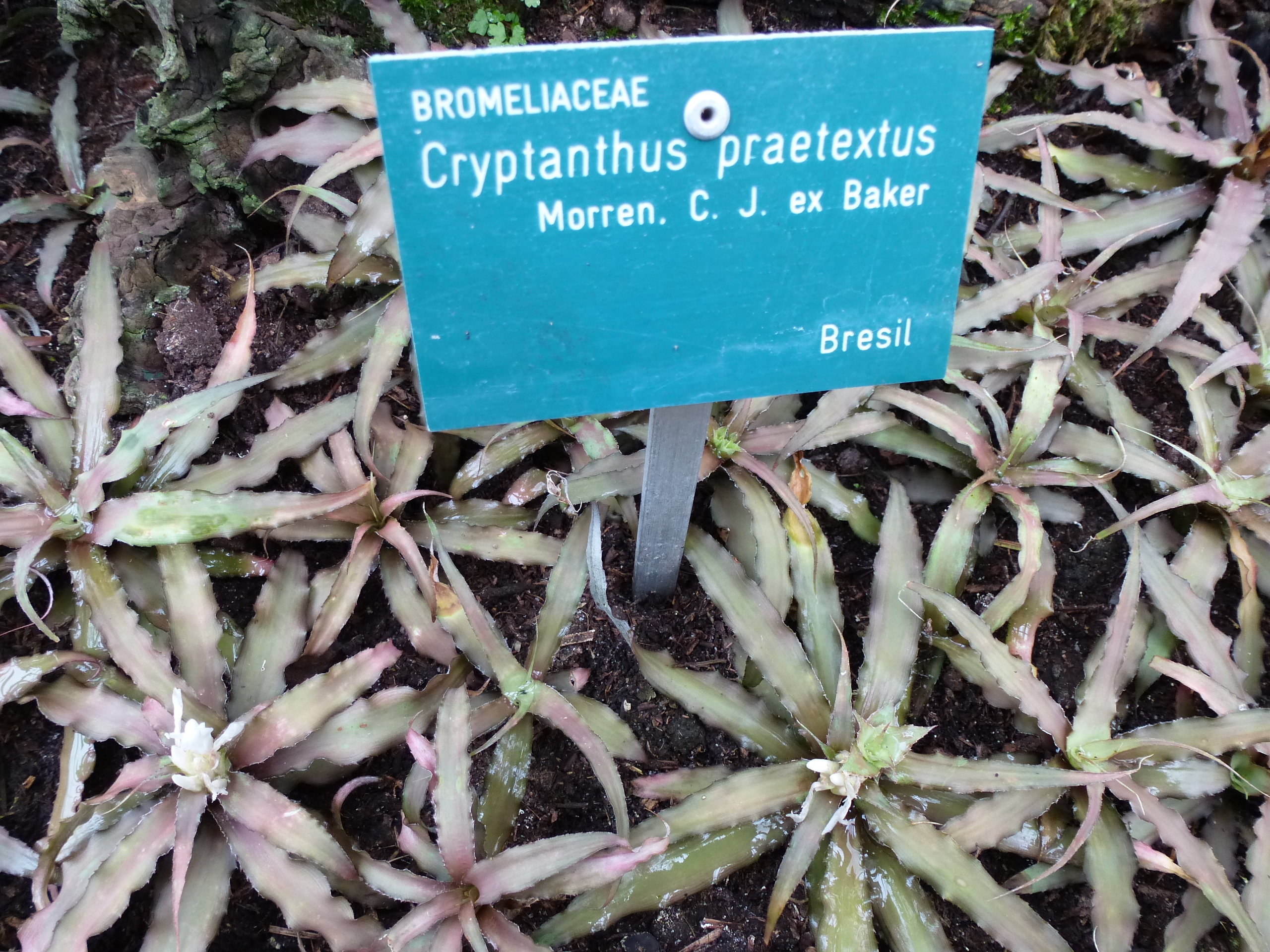 Cryptanthus praetextus - Serres d'Auteuil - Jardin botanique de la Ville de Paris - France